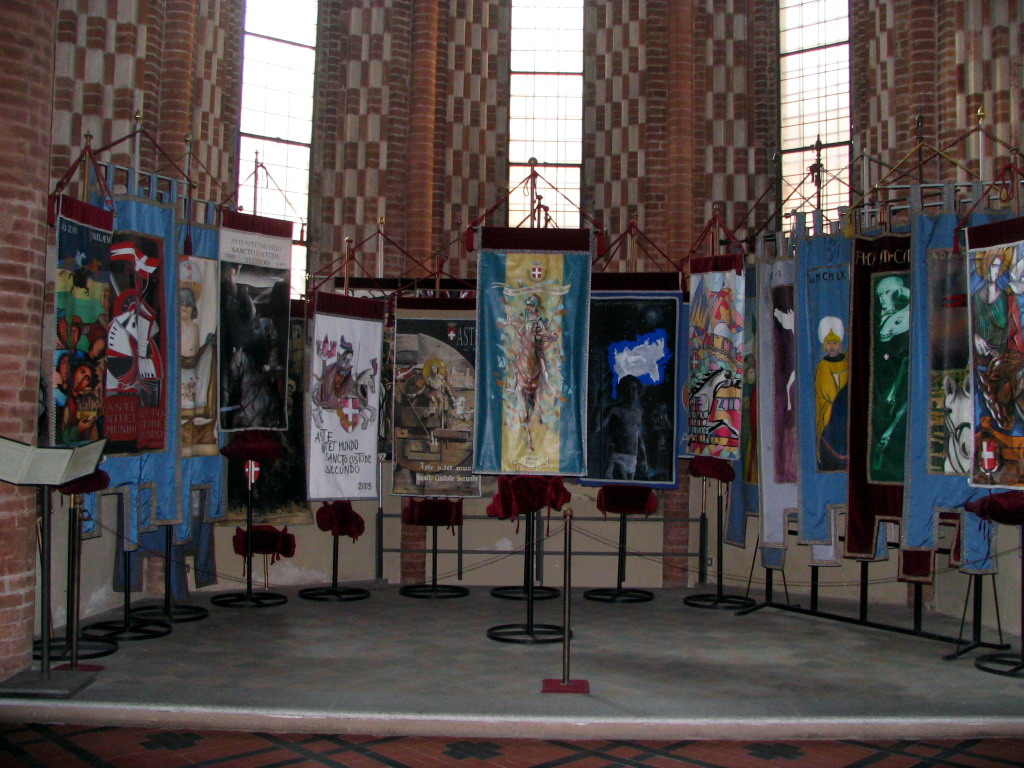 Asti, Collegiata di San Secondo, Palii offerti per la Collegiata